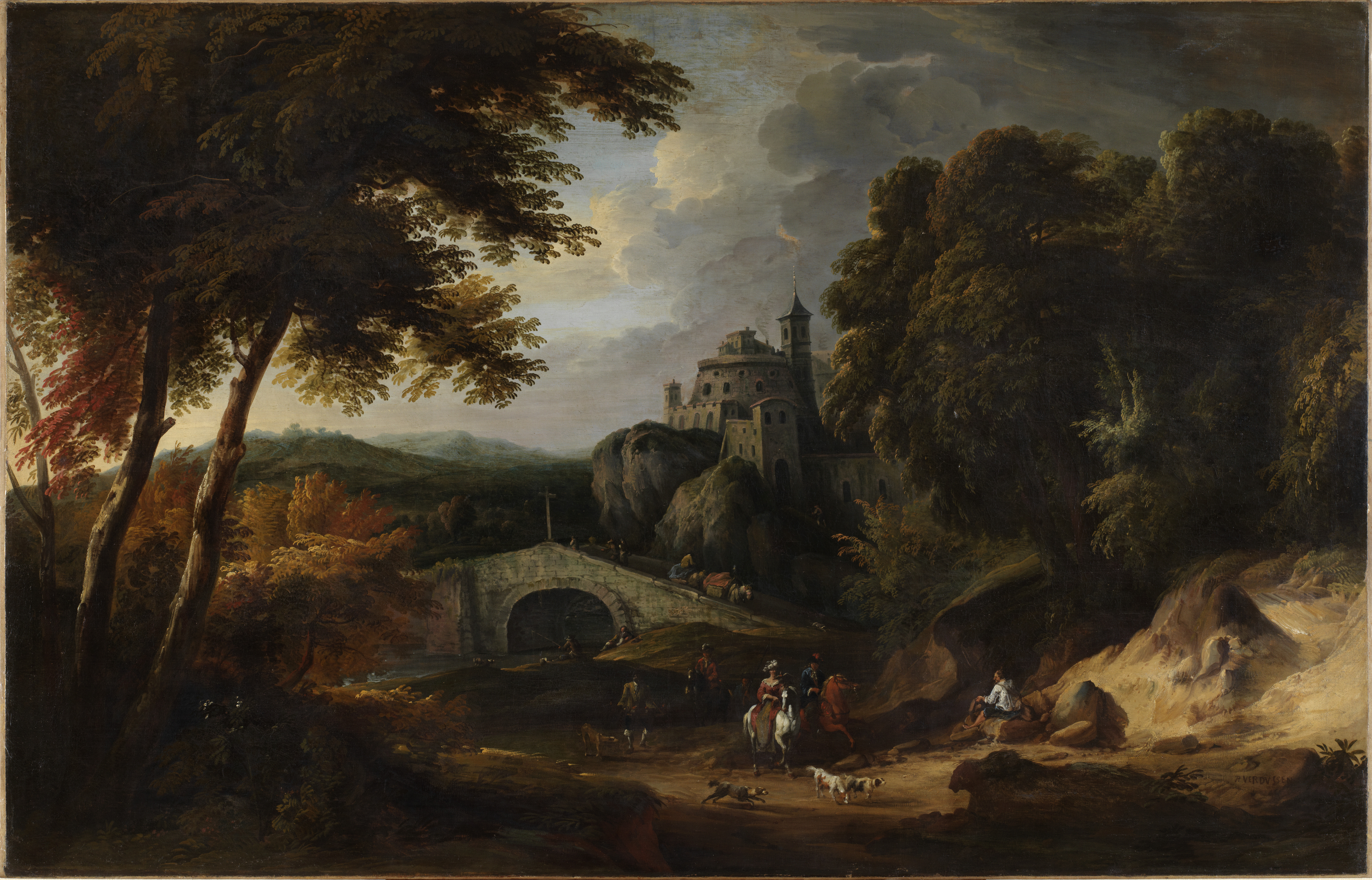 schilderij ( Pieter Verdussen ( & Jasper Broers ( Museum Plantin-Moretus